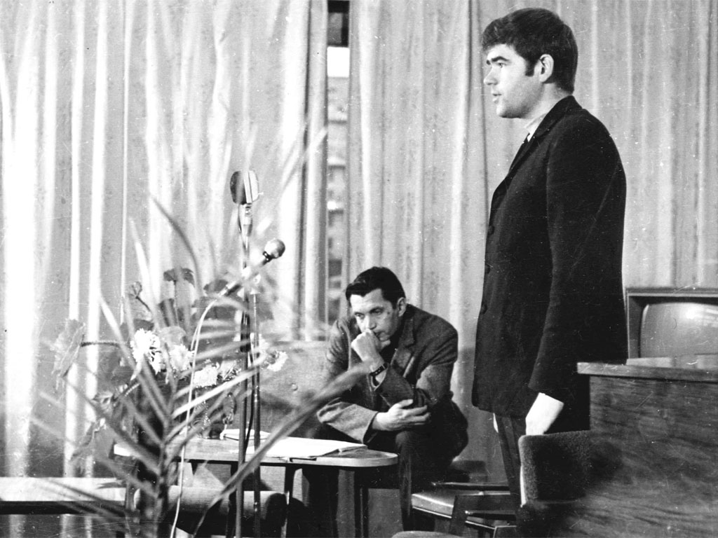 Роберт Рождественский слушает выступление молодых поэтов в Государственной республиканской юношеской библиотеке (ныне РГБМ), 1970-е годы.